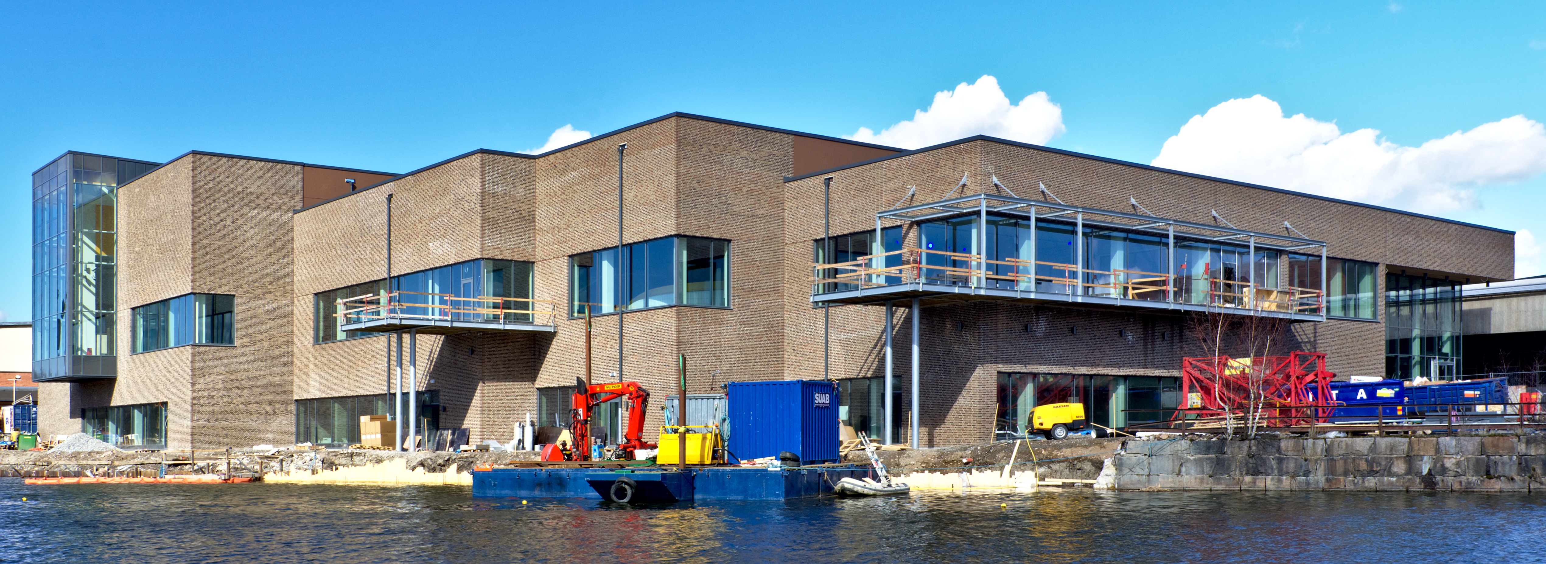 Munktellbadet i Eskilstuna, under bygget 1 april 2016.